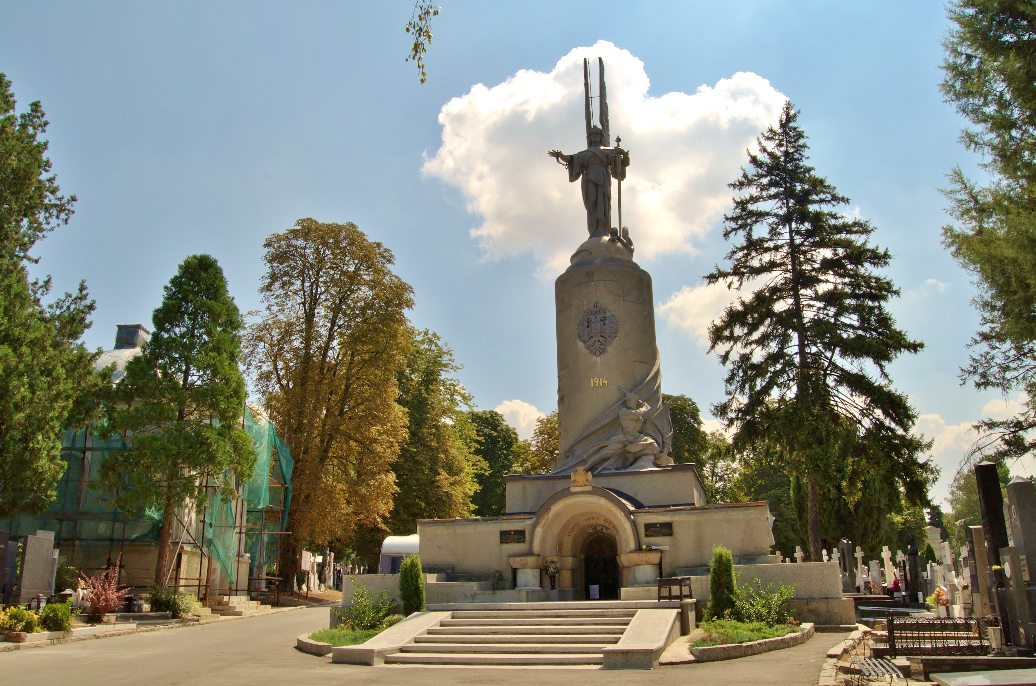 Novo groblje